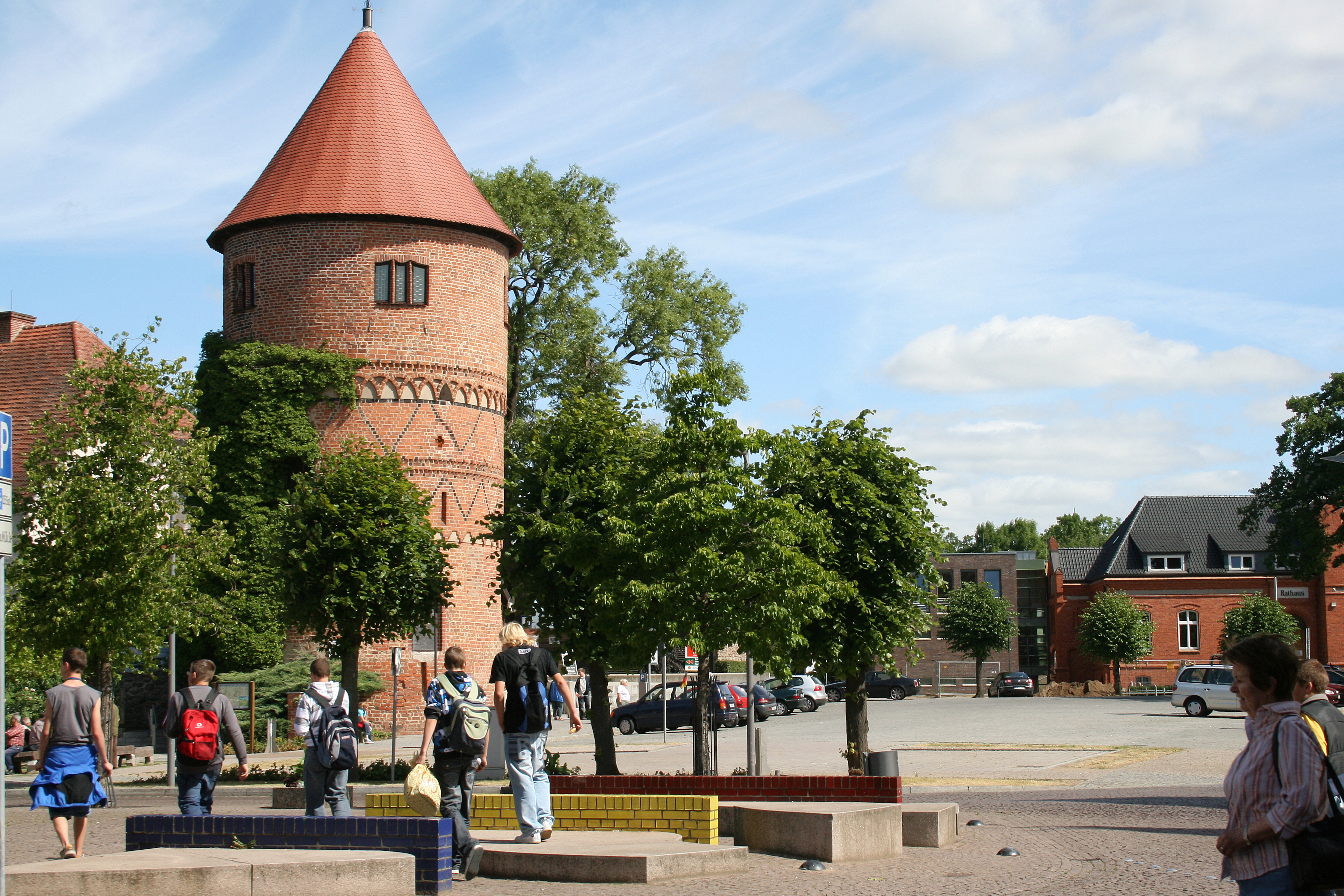 Alter Amtsturm in Lübz (Mecklenburg-Vorpommern).